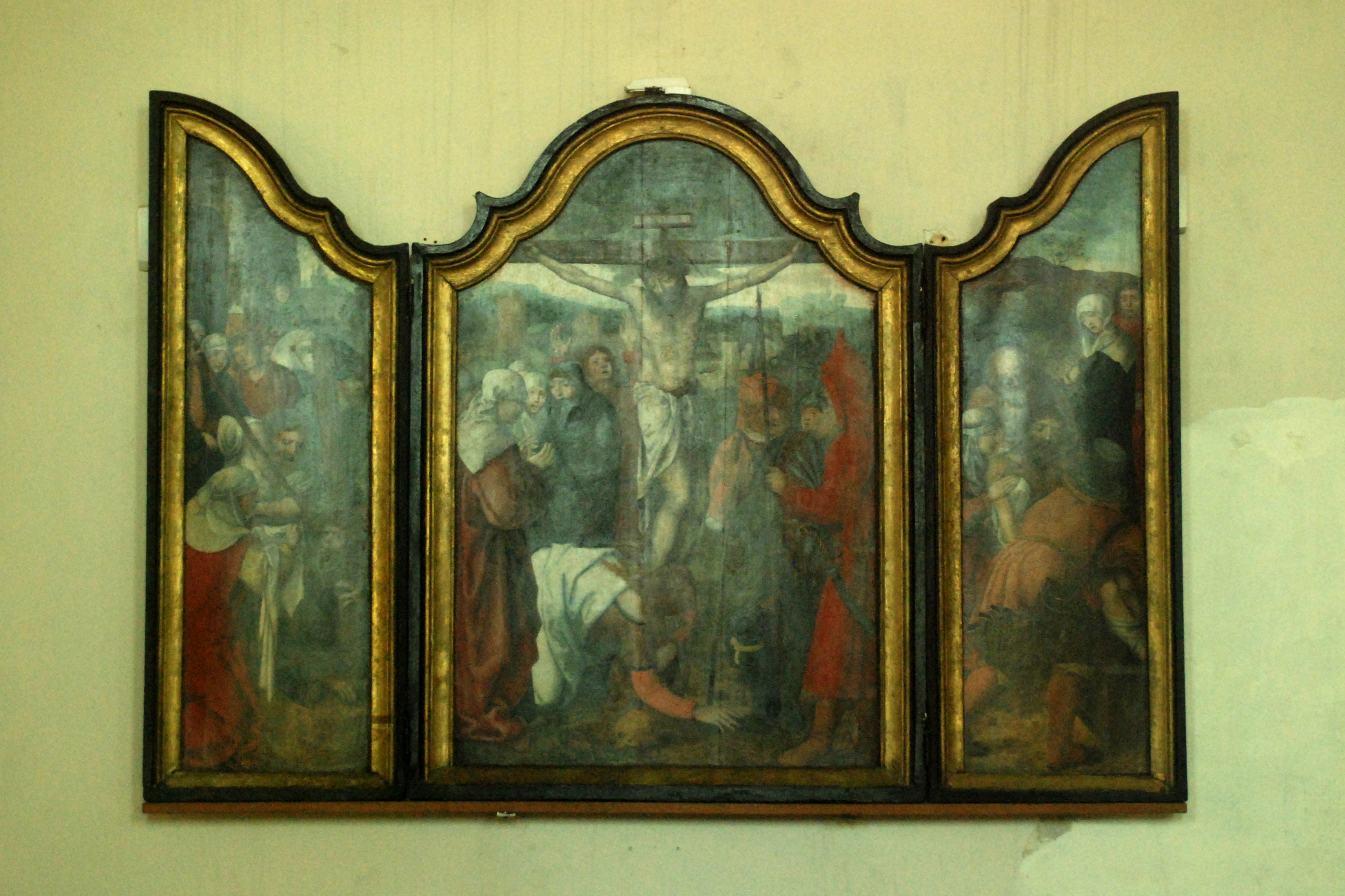 Belgique - Brabant wallon - Église de Court-Saint-Étienne